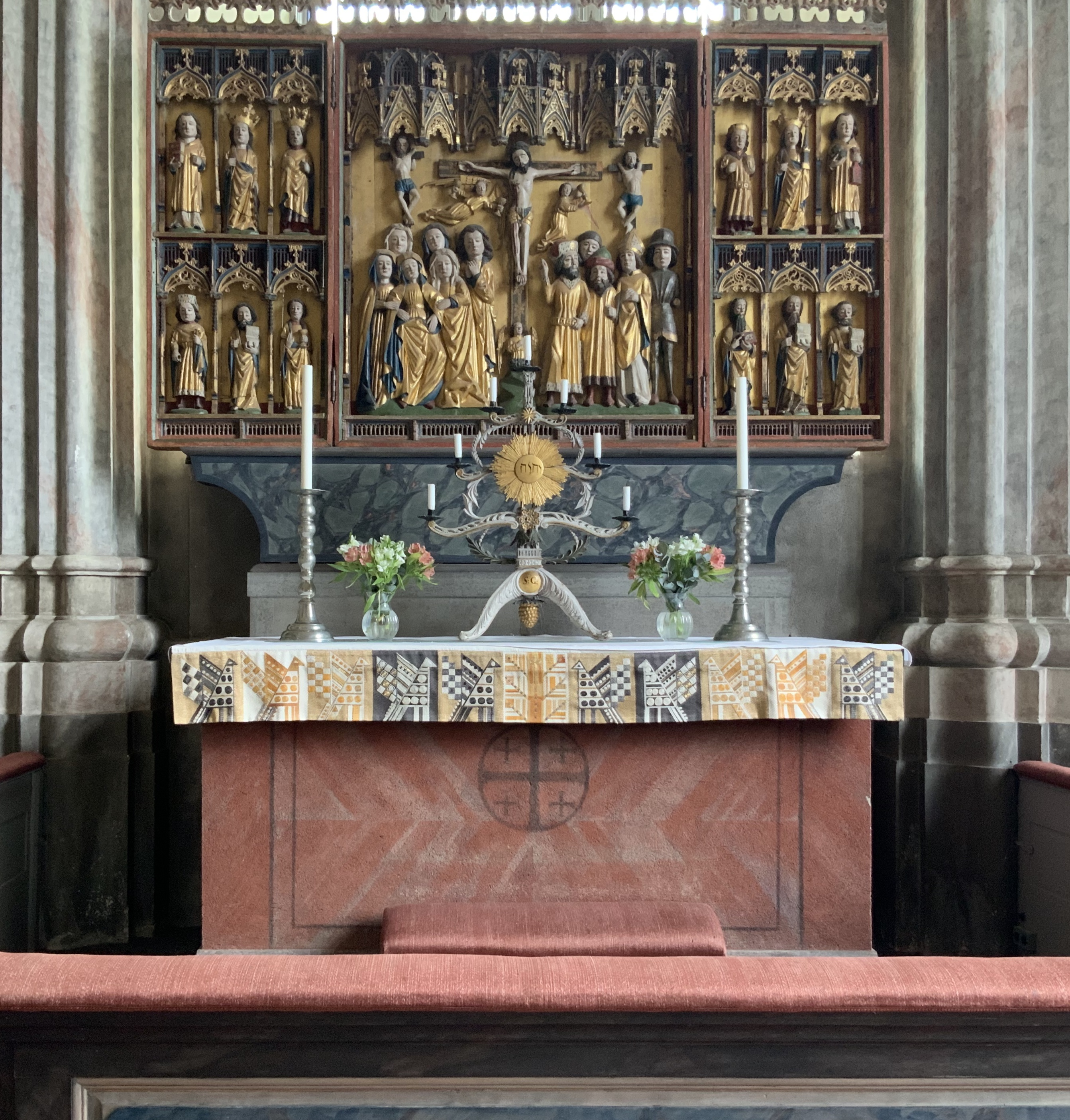 Altarskåp i Vika kyrka i Dalarna av Jordan Målare